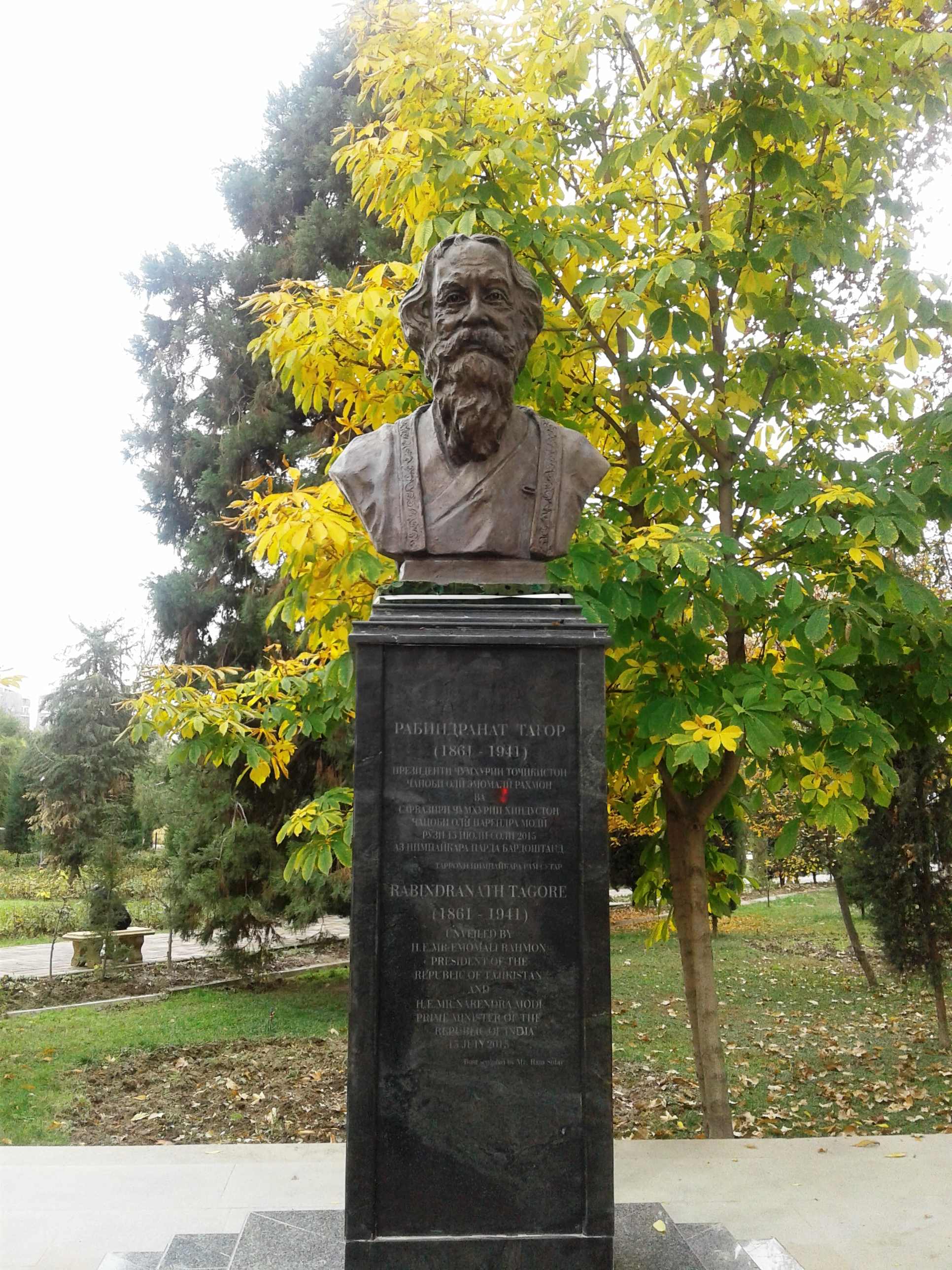 Бюст Рабиндранату Тагору (1861-1941) установленный в одном из скверов г. Душанбе